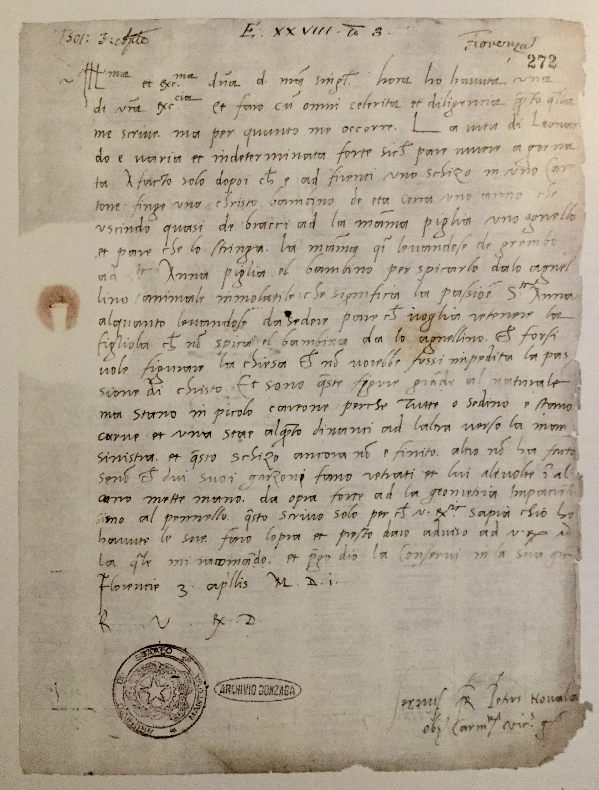 Lettre manuscrite de Fra Pietro da Novellara à Isabelle d'Este 3 avril 1501 où il explique la rejet du peintre pour la peinture et dans laquelle il décrit un carton de Léonard de Vinci représentant une Sainte Anne.